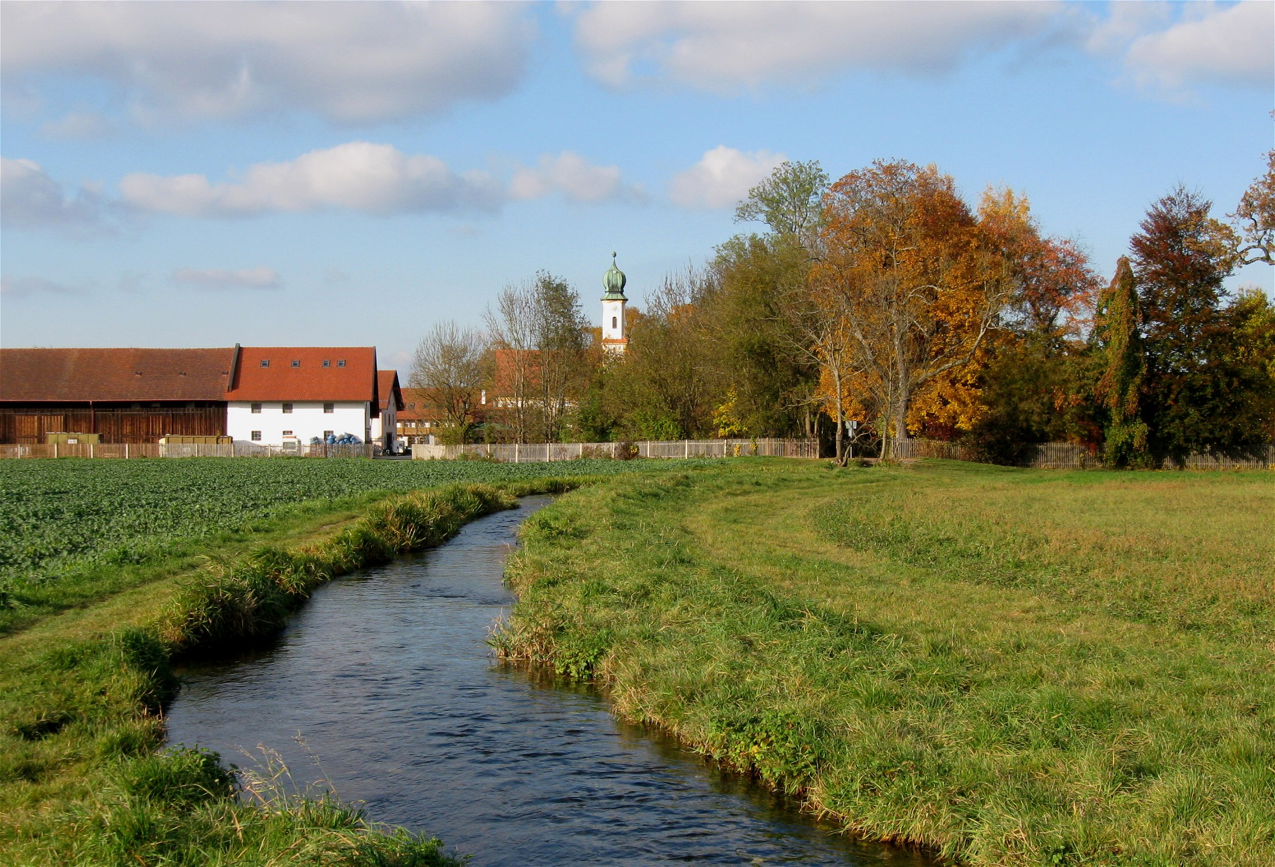 Unterbiberg, Hachinger Bach, Kirche St. Georg